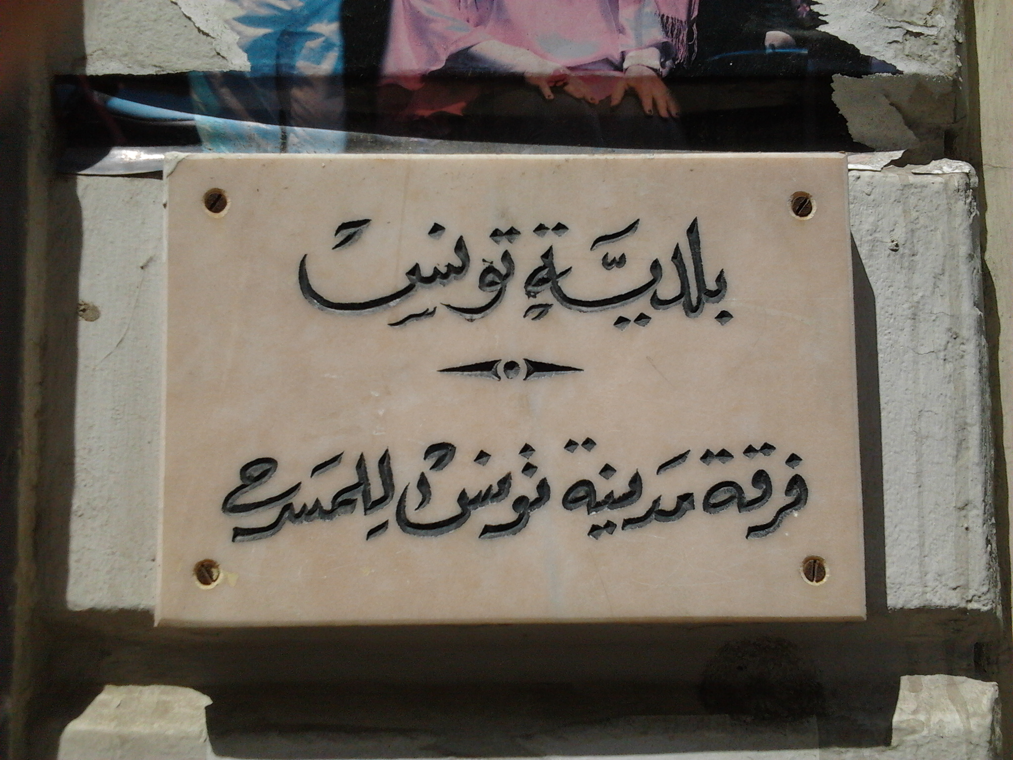 Local de la troupe théâtrale de la municipalité de Tunis